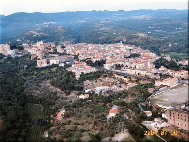 Sessa Aurunca - veduta aerea